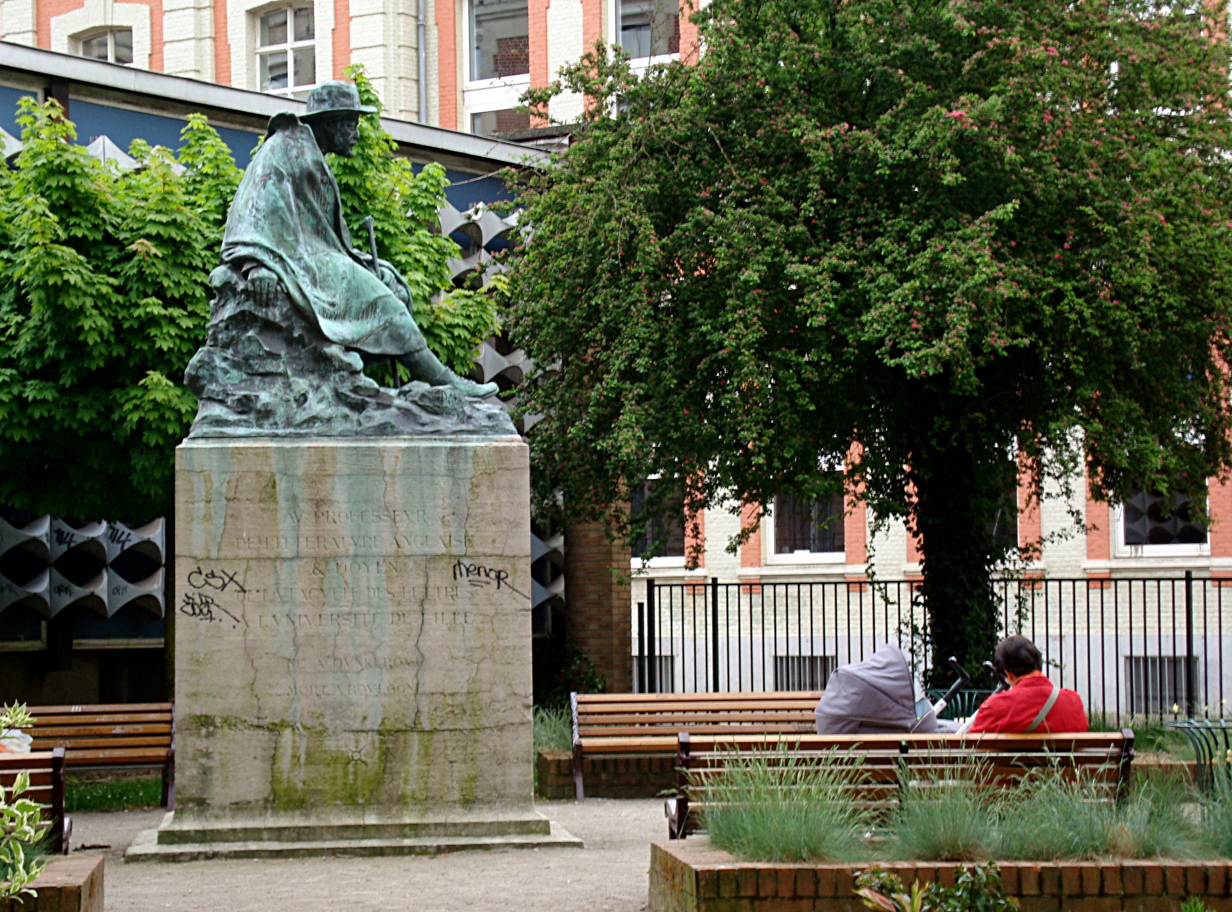 La statue d'Auguste Angellier (1848-1911), doyen de la faculté de Lettres de Lille et poète, réalisée par le sculpteur Eugène Déplechin et inaugurée le 13 mai 1928 à Lille (Nord).